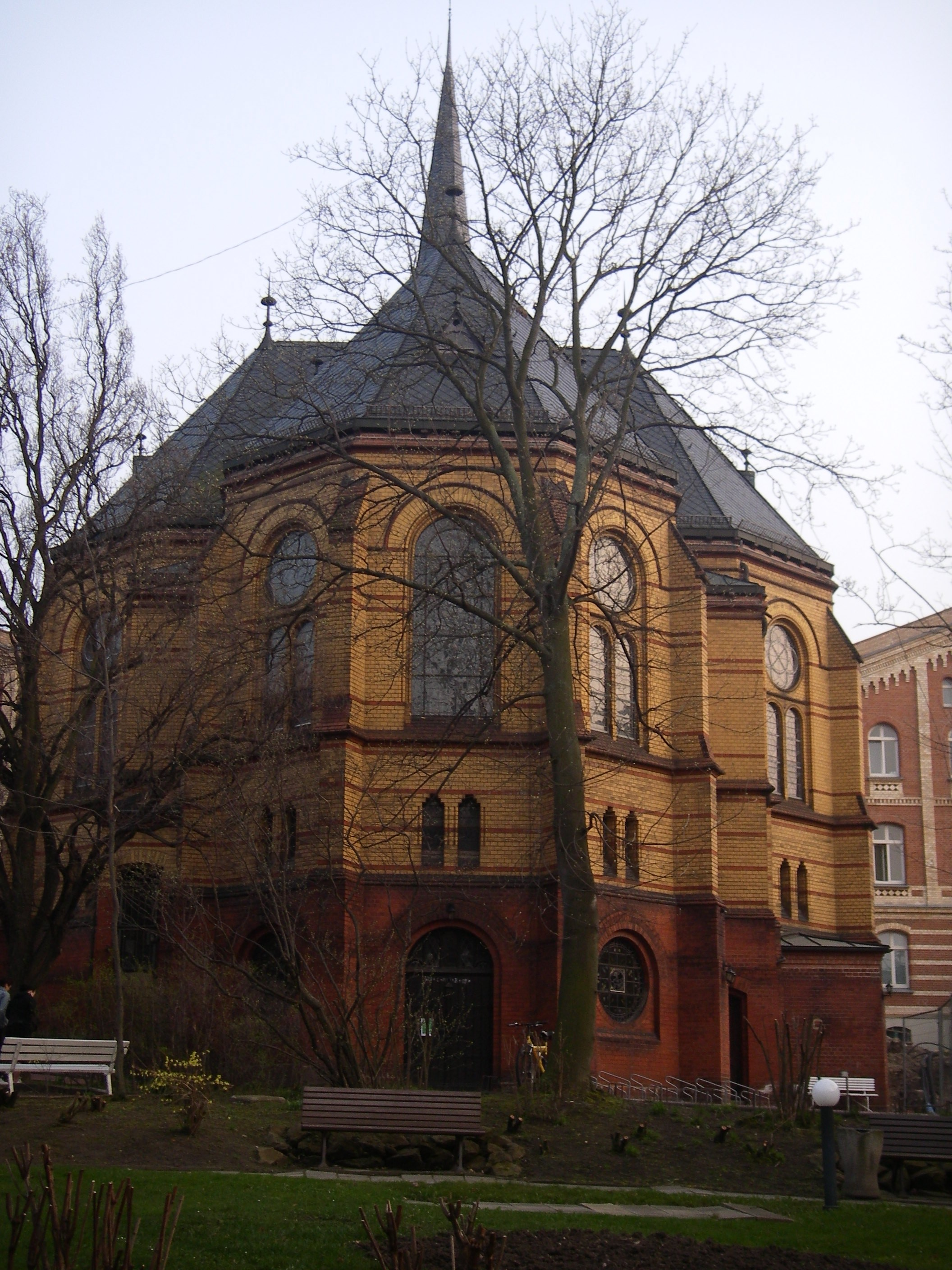 Kirche im Diakoniewerk in Halle an der Saale